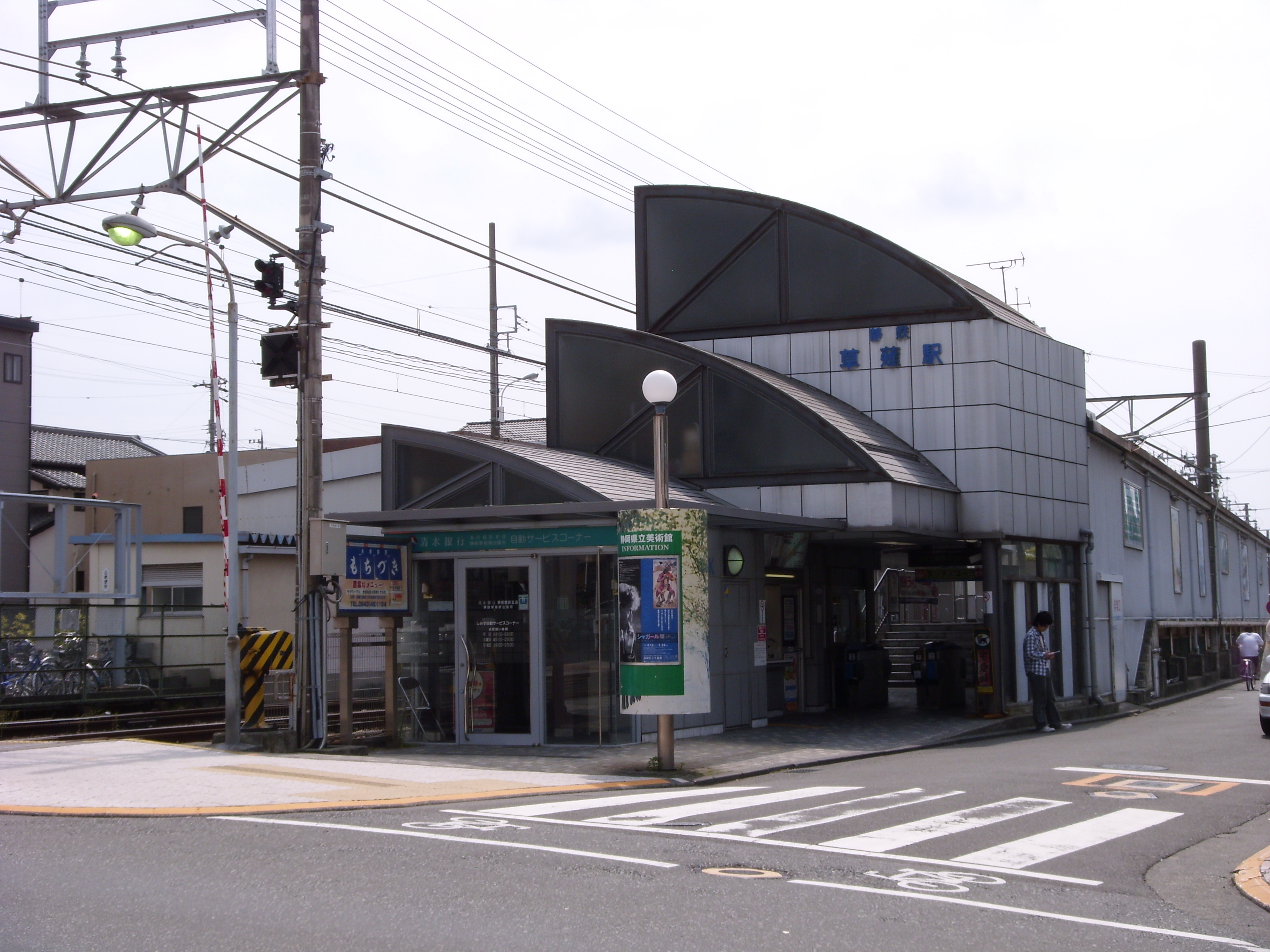 Kusanagi Station (Shizuoka-Shimizu railway)